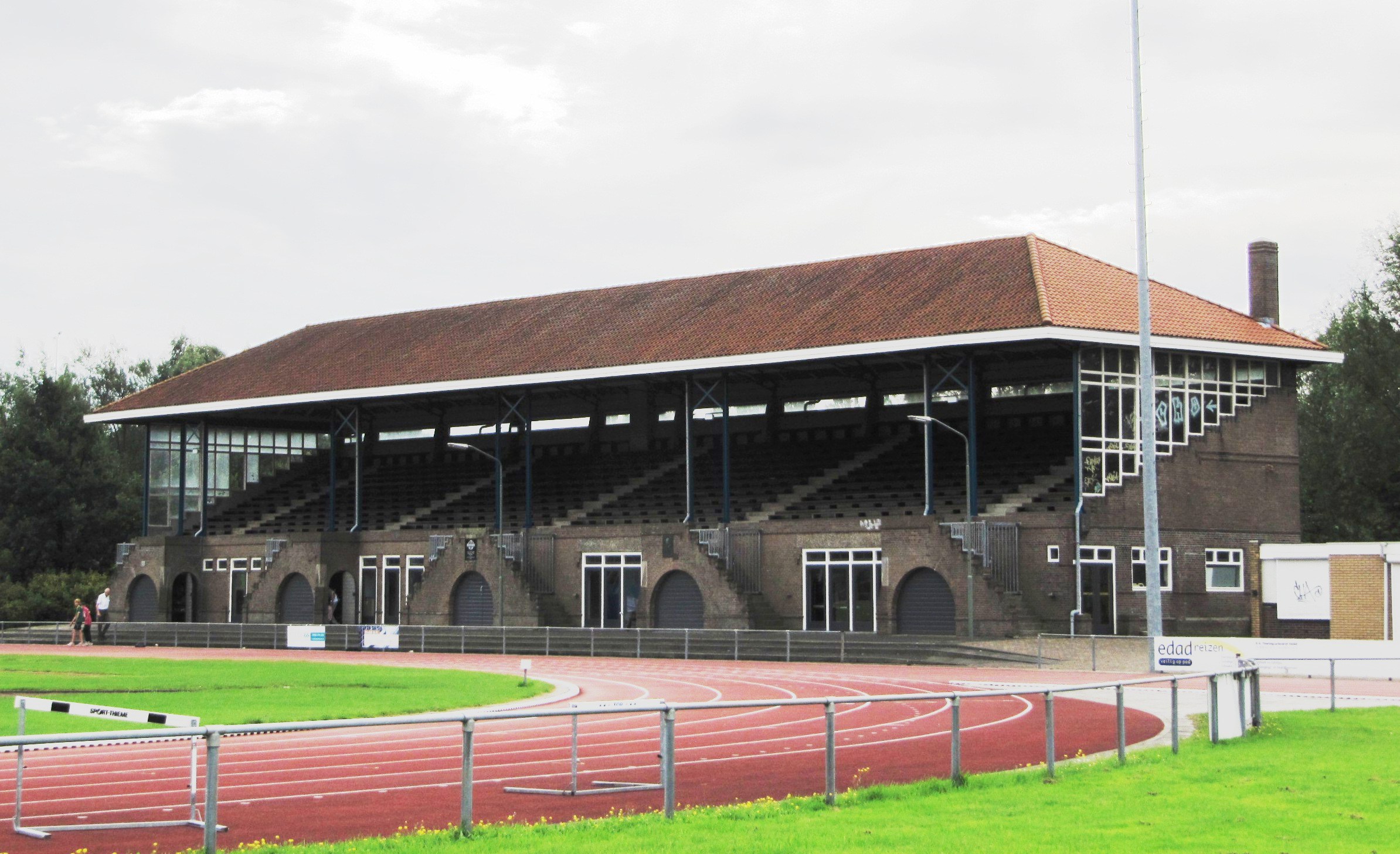 RM522363 Dordrecht - Halmaheiraplein 26.jpg